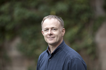 Jörg Alt